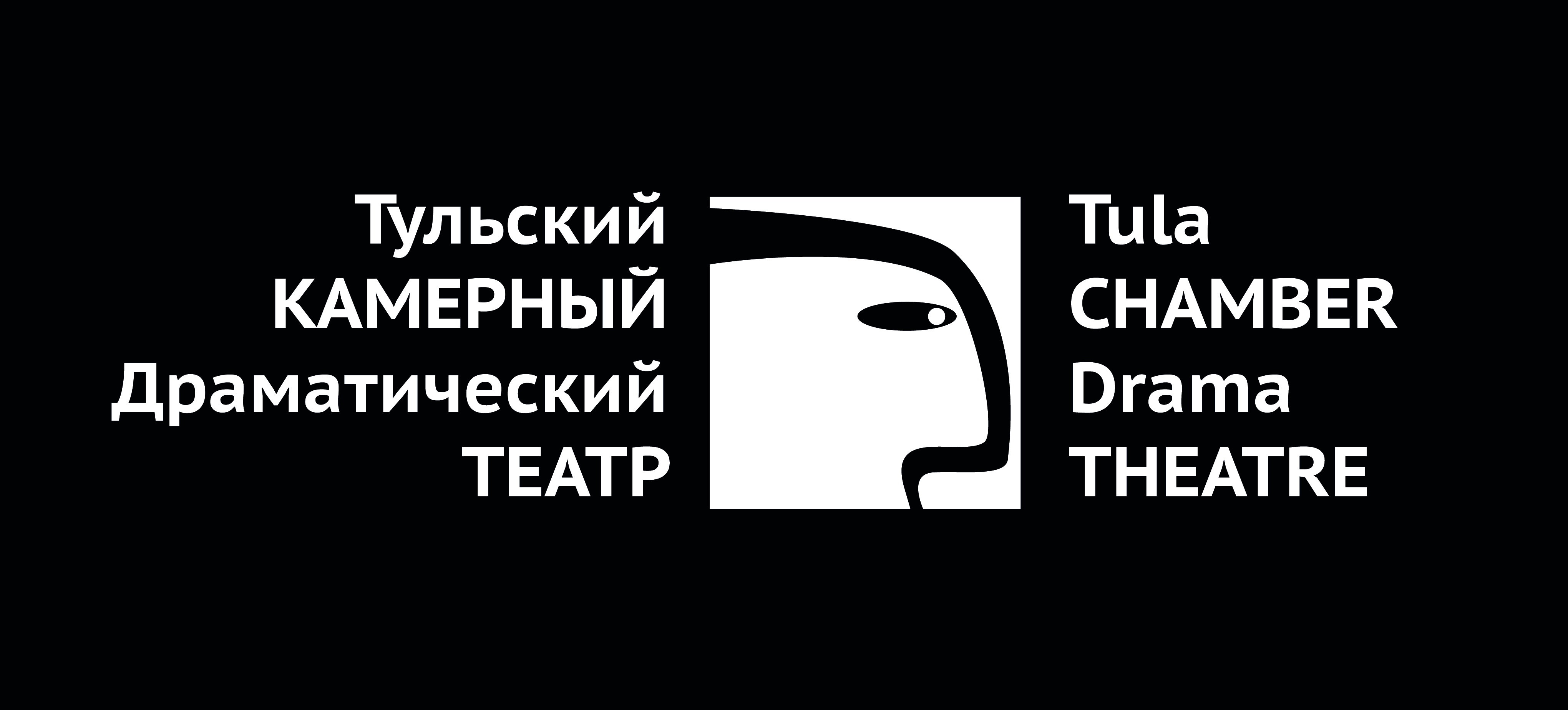 Логотип театра